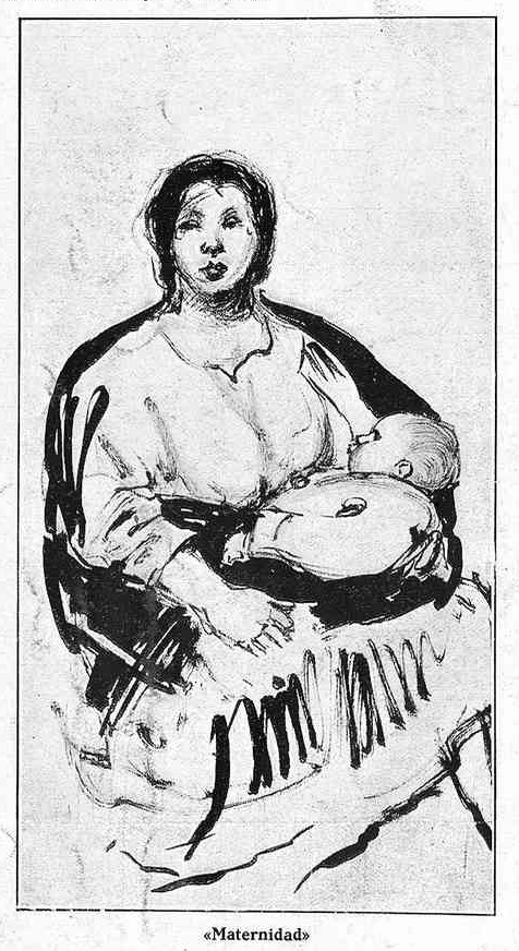 Maternidad.